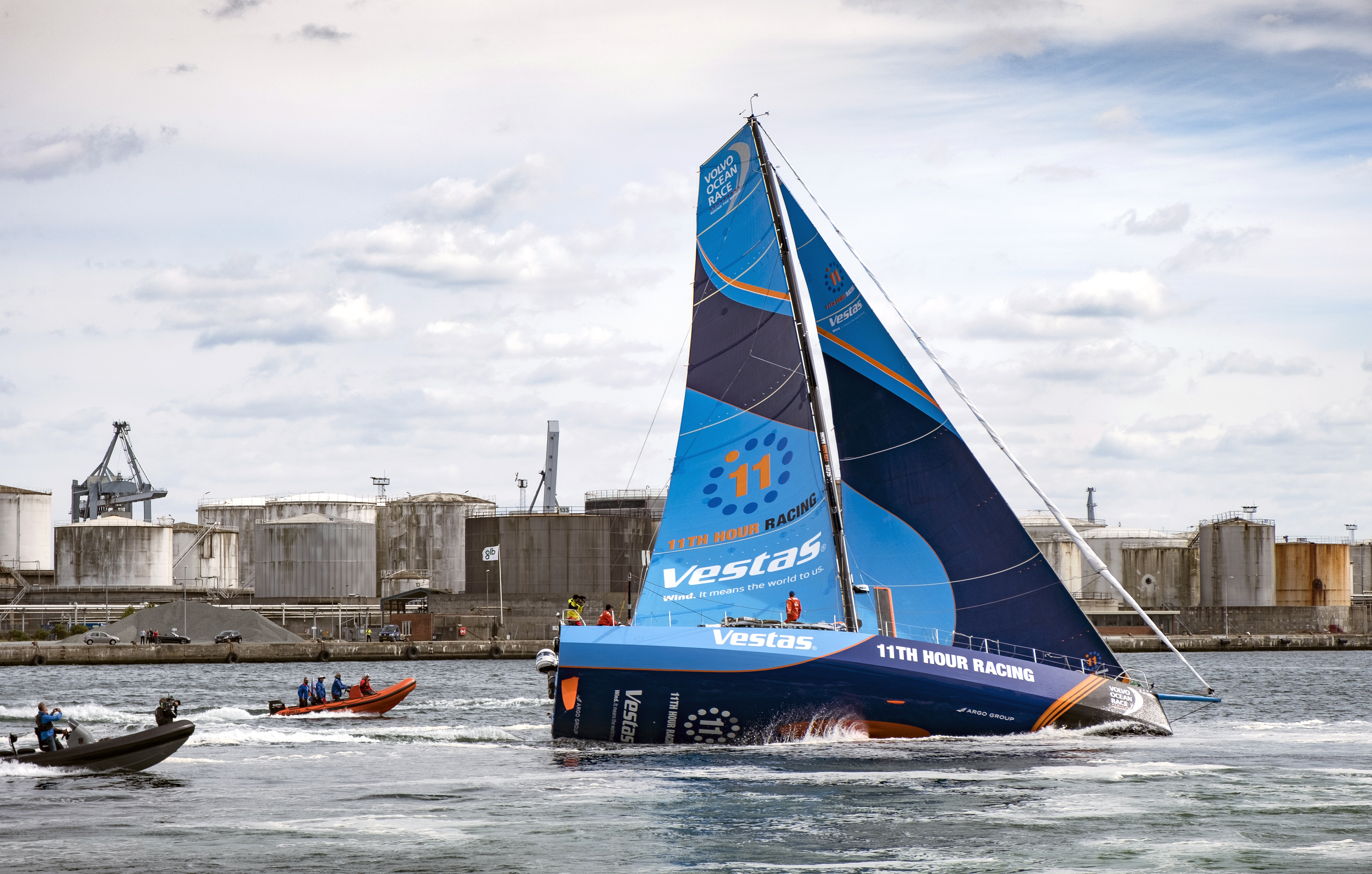 Den 22 juni 2018 besökte segeltävlingen Volvo Ocean Race för första gången Danmark när båtarna gjorde en så kallad fly by och vände inne i hamnen vid Dokk1 i Aarhus. På bilden båten som sponsras av danska vindkraftsjätten Vestas som har sitt huvudkontor i Aarhus...Photo: News Øresund - Johan Wessman.© News Øresund - Johan Wessman (CC BY 3.0)..Detta verk av News Øresund är licensierat under en Creative Commons Erkännande 3.0 Unported-licens (CC BY 3.0). Bilden får fritt publiceras under förutsättning att källa anges. .The picture can be used freely under the prerequisite that the source is given. News Øresund, Malmö, Sweden.News Øresund är en oberoende regional nyhetsbyrå som är en del av det oberoende dansk-svenska kunskapscentrat Øresundsinstituttet...